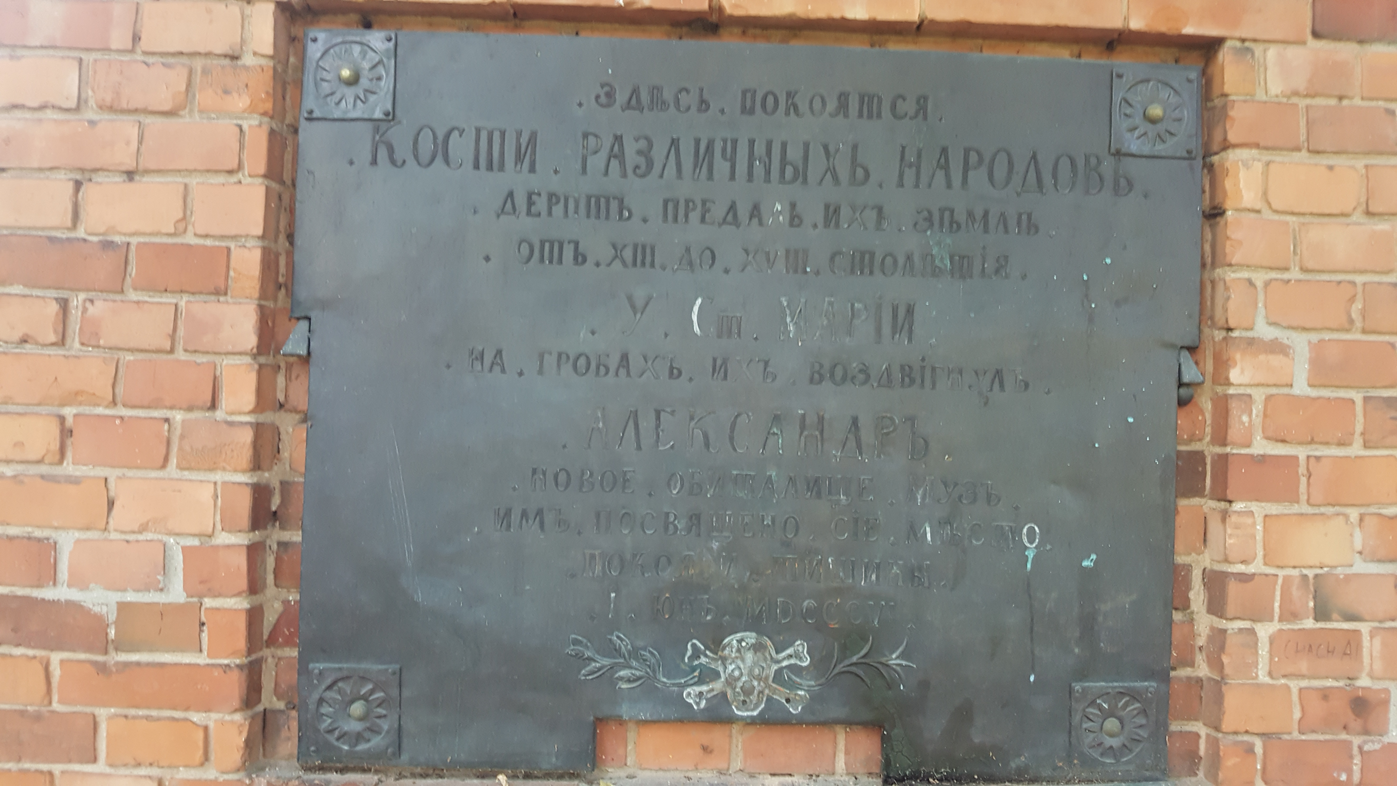 Tablica Rahvaste mälestussammas w języku rosyjskim.